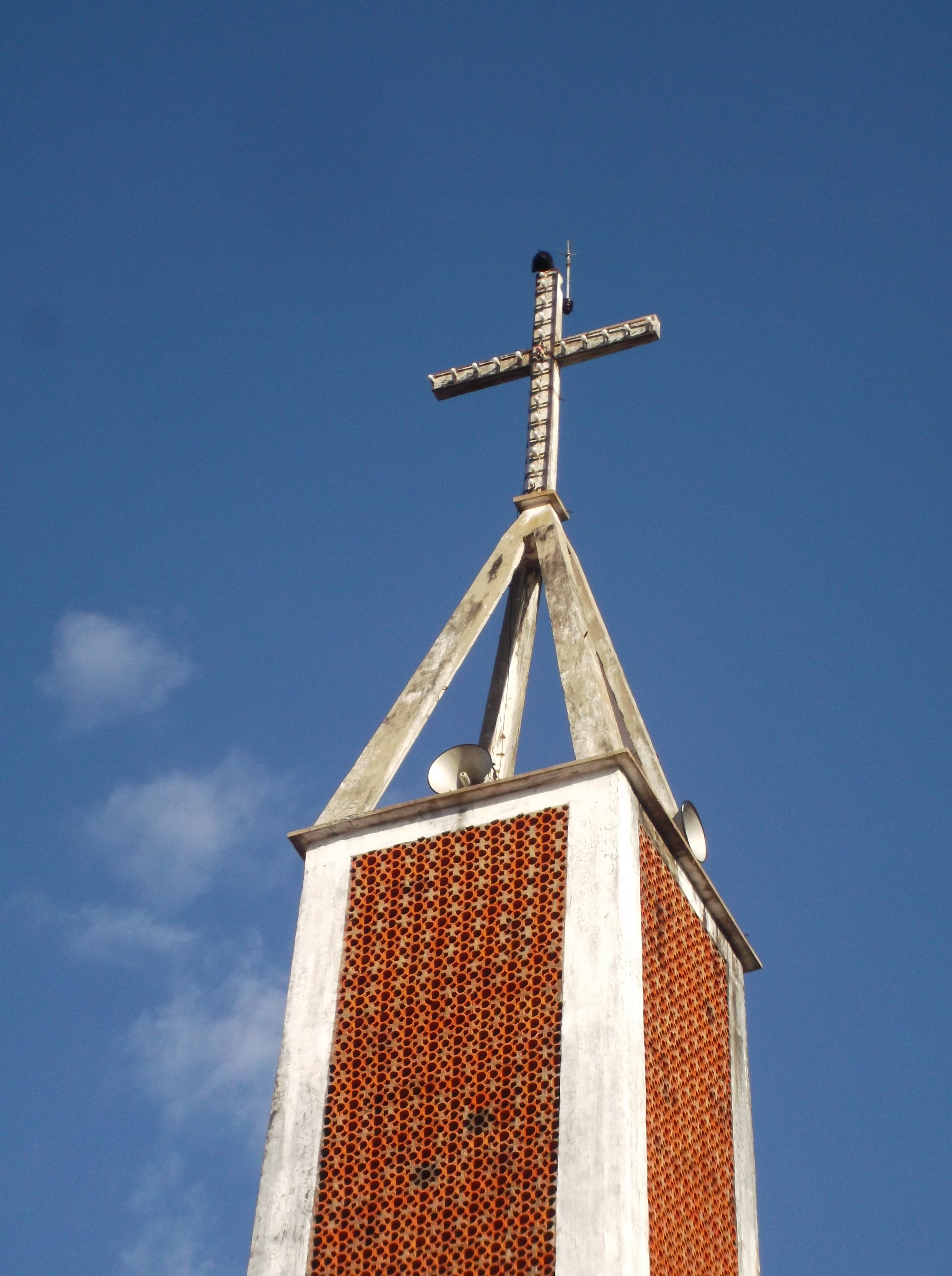 Cimo do Obelisco de Campo Maior com uma cruz do cristianismo.